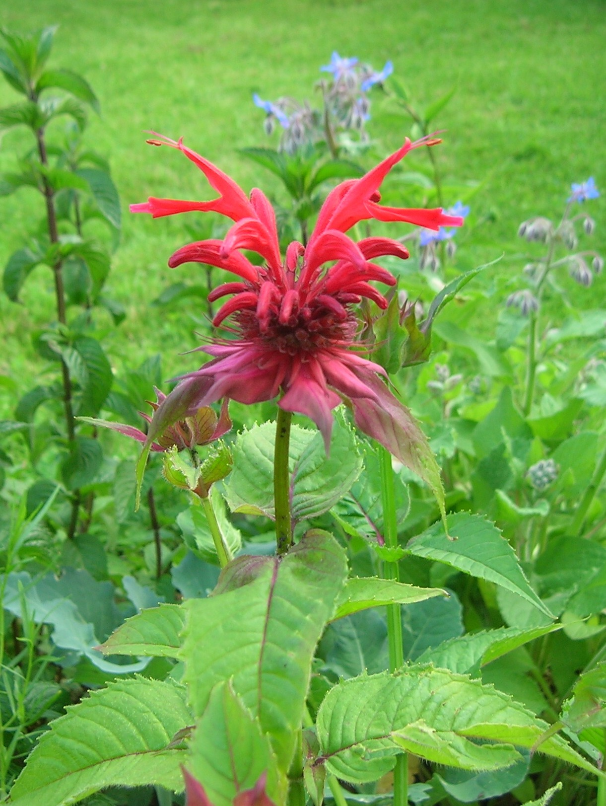 Blumenbild